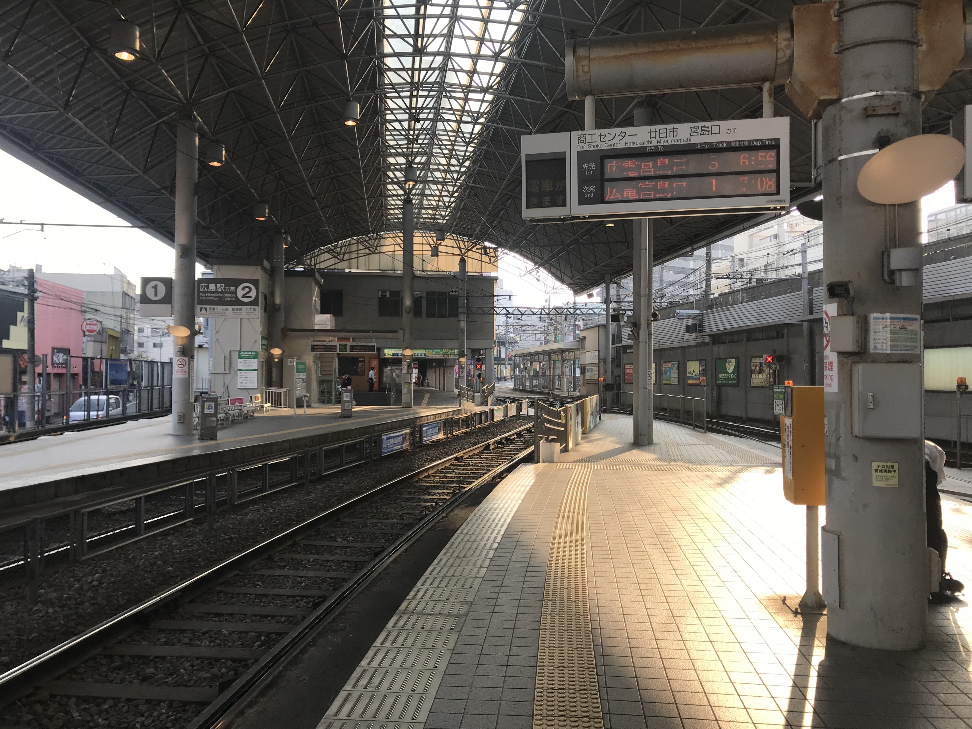 広電西広島駅のホーム(奥は福島町方面)